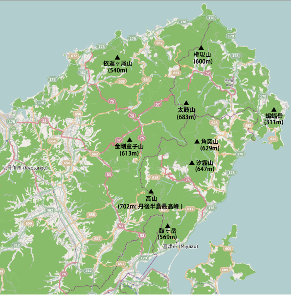 京都府北部のja:丹後半島にある主要な山の位置図 This map may be incomplete, and may contain errors. Don't rely solely on it for navigation.